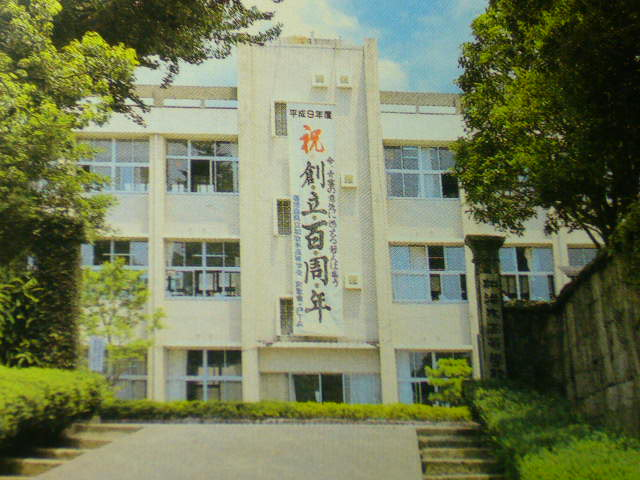 加治木高校校舎